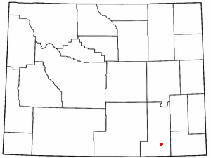 map